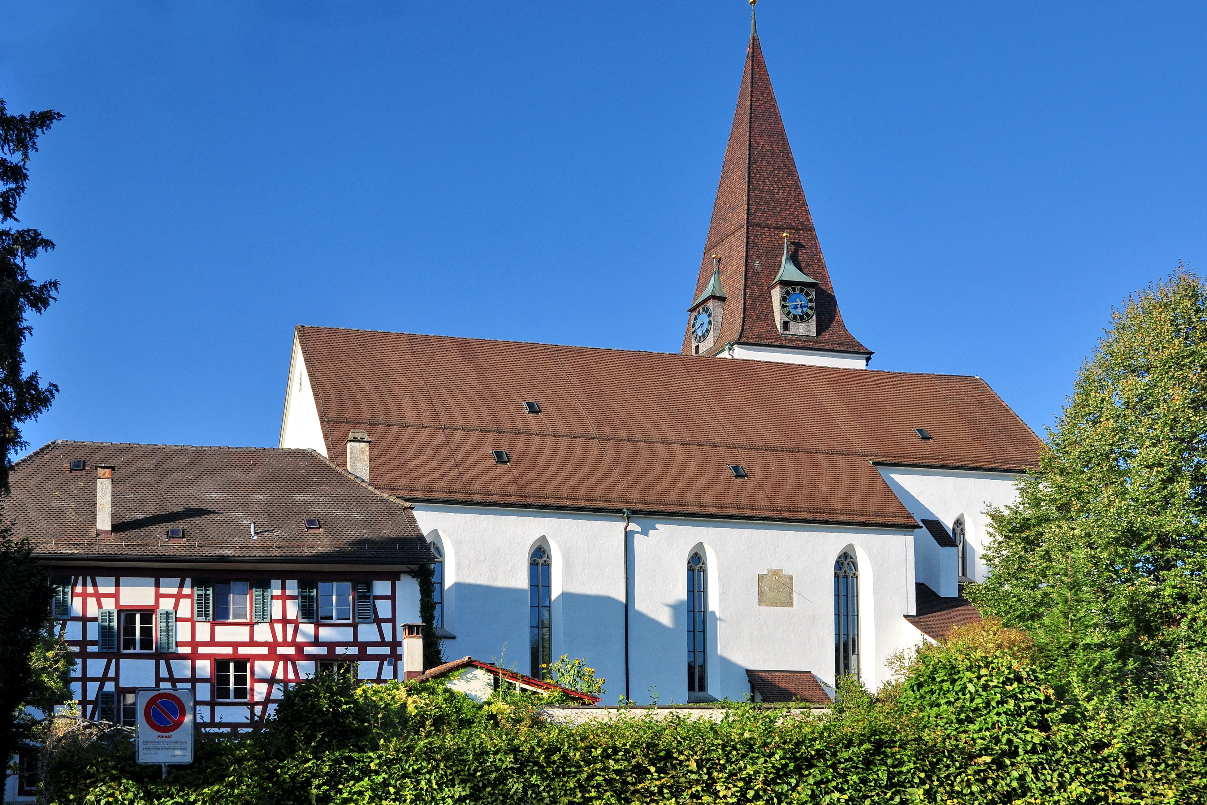 Reformierte Kirche mit Pfarrhaus, Lindenplatz in Elgg (Switzerland)